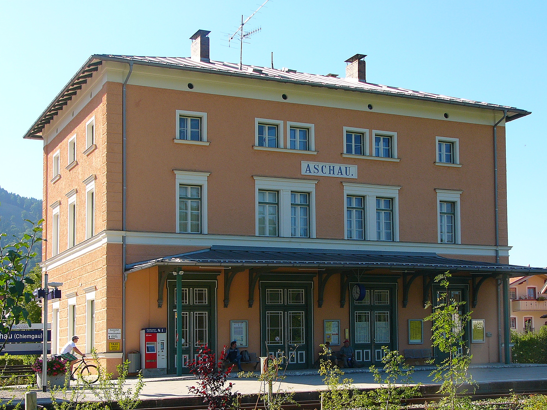 Bahnhof Aschau; Empfangsgebäude, zweieinhalbgeschossiger Neurenaissance-Putzbau mit aufgeputztem Rustikaerdgeschoss, Eckquaderung und Gesims, Flachwalmdach, erbaut 1884.This is a photograph of an architectural monument.